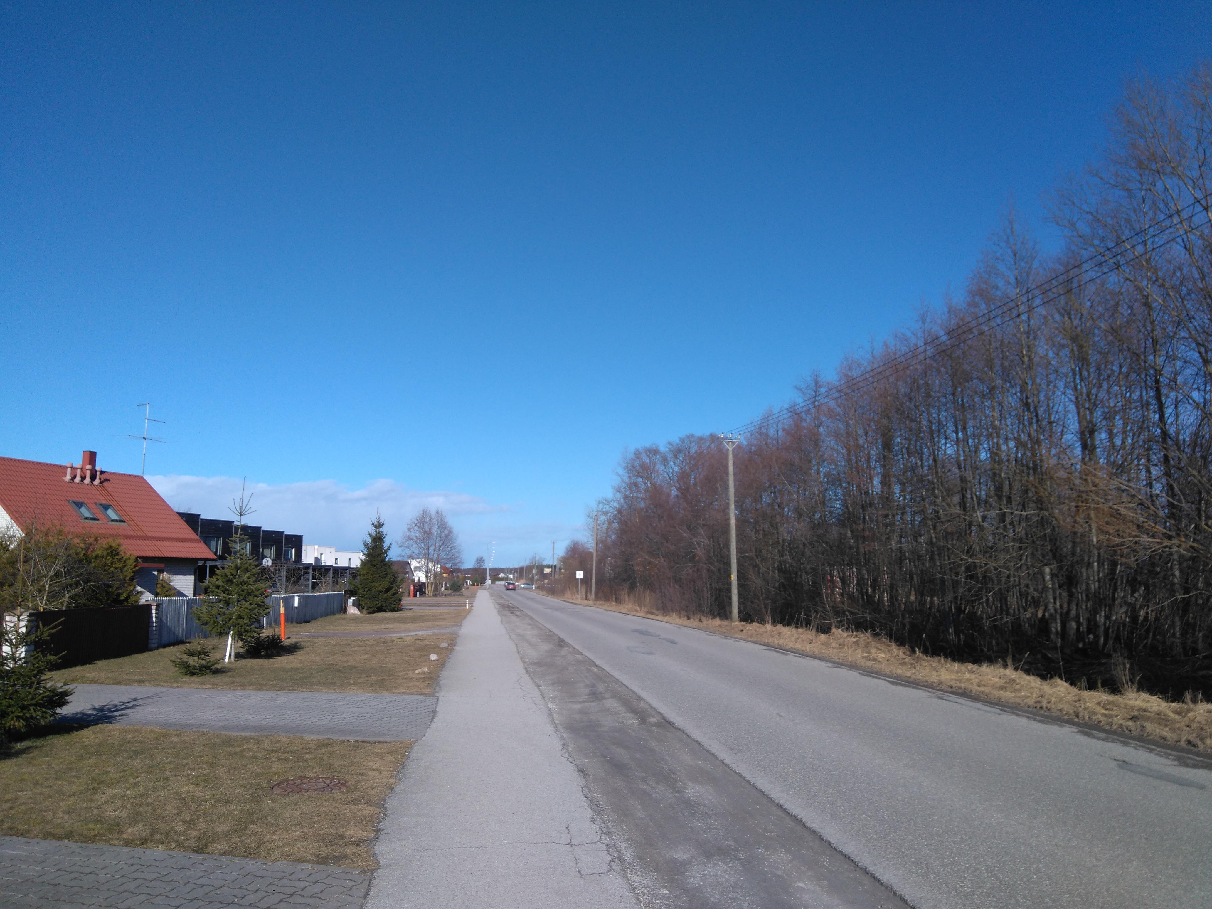 Taludevahe tänav